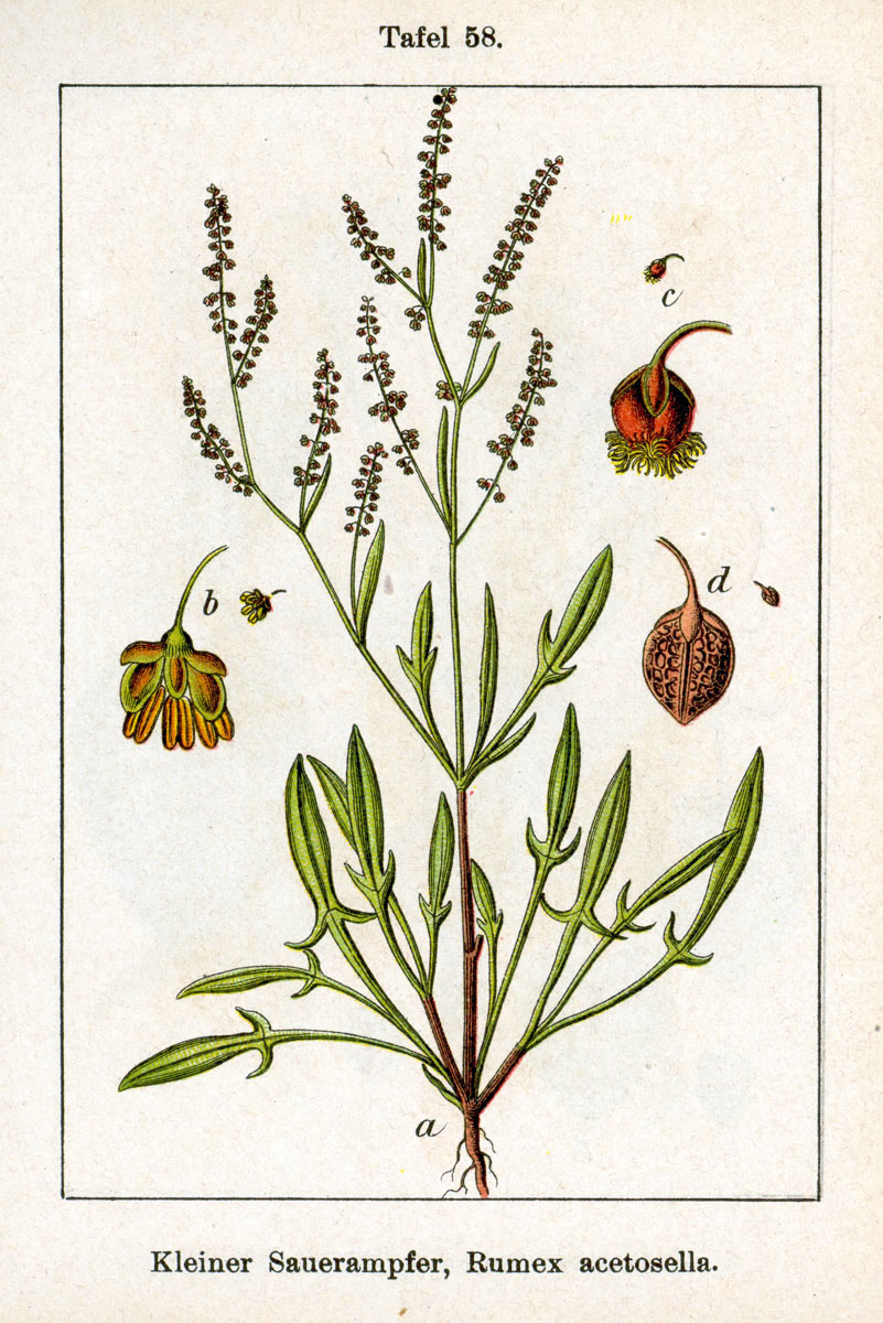 Rumex acetosella L. s. l. Original Description Kleiner Sauerampfer, Rumex acetosella